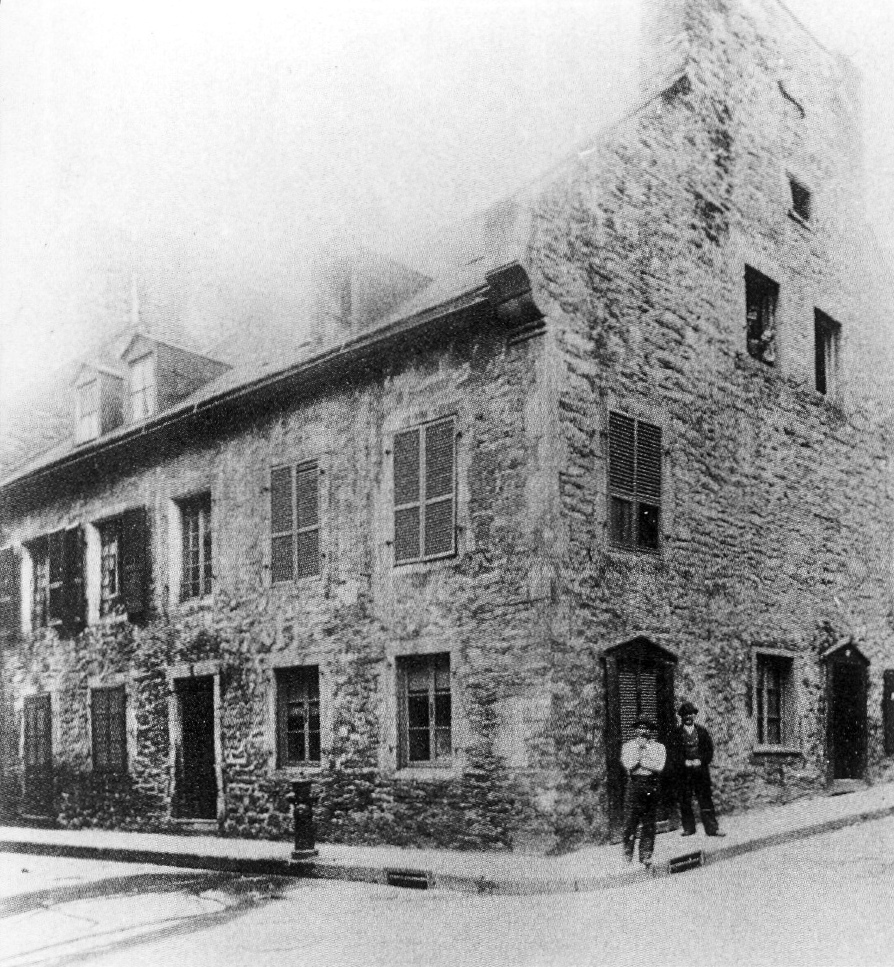 Le premier édifice où se sont trouvés les locaux du journal Le Devoir jusqu'en 1914, au 71A, rue Saint-Jacques, à Montréal (Québec)